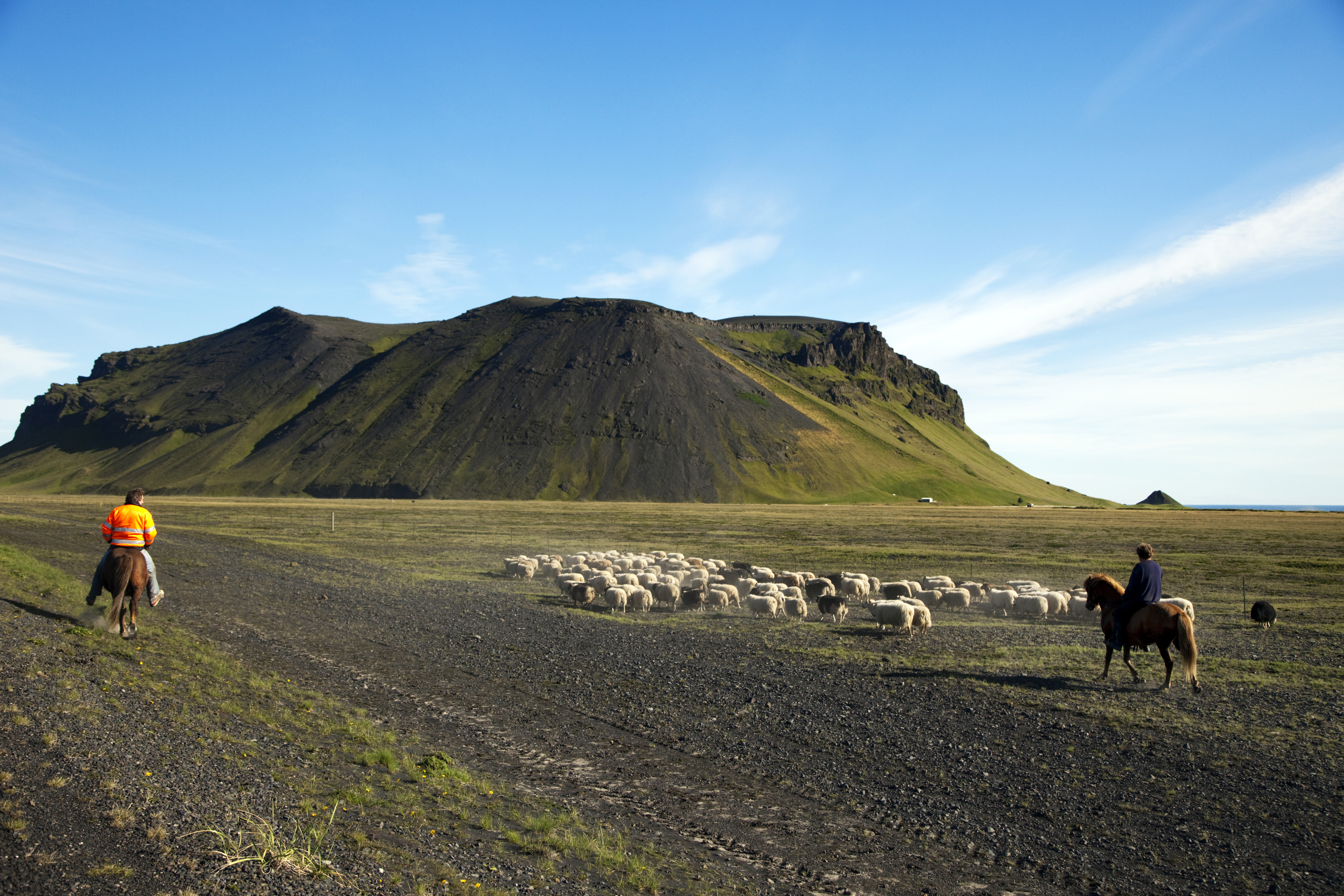 Hesteridning